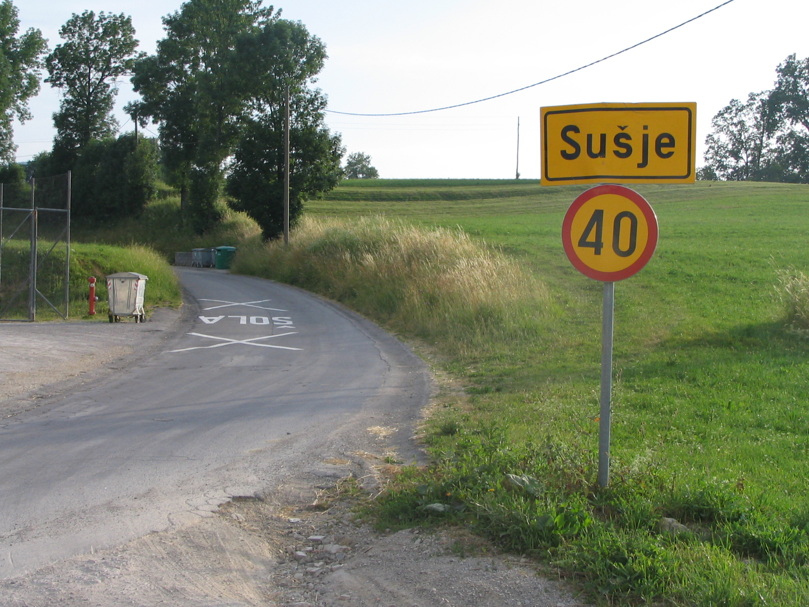 Sušje